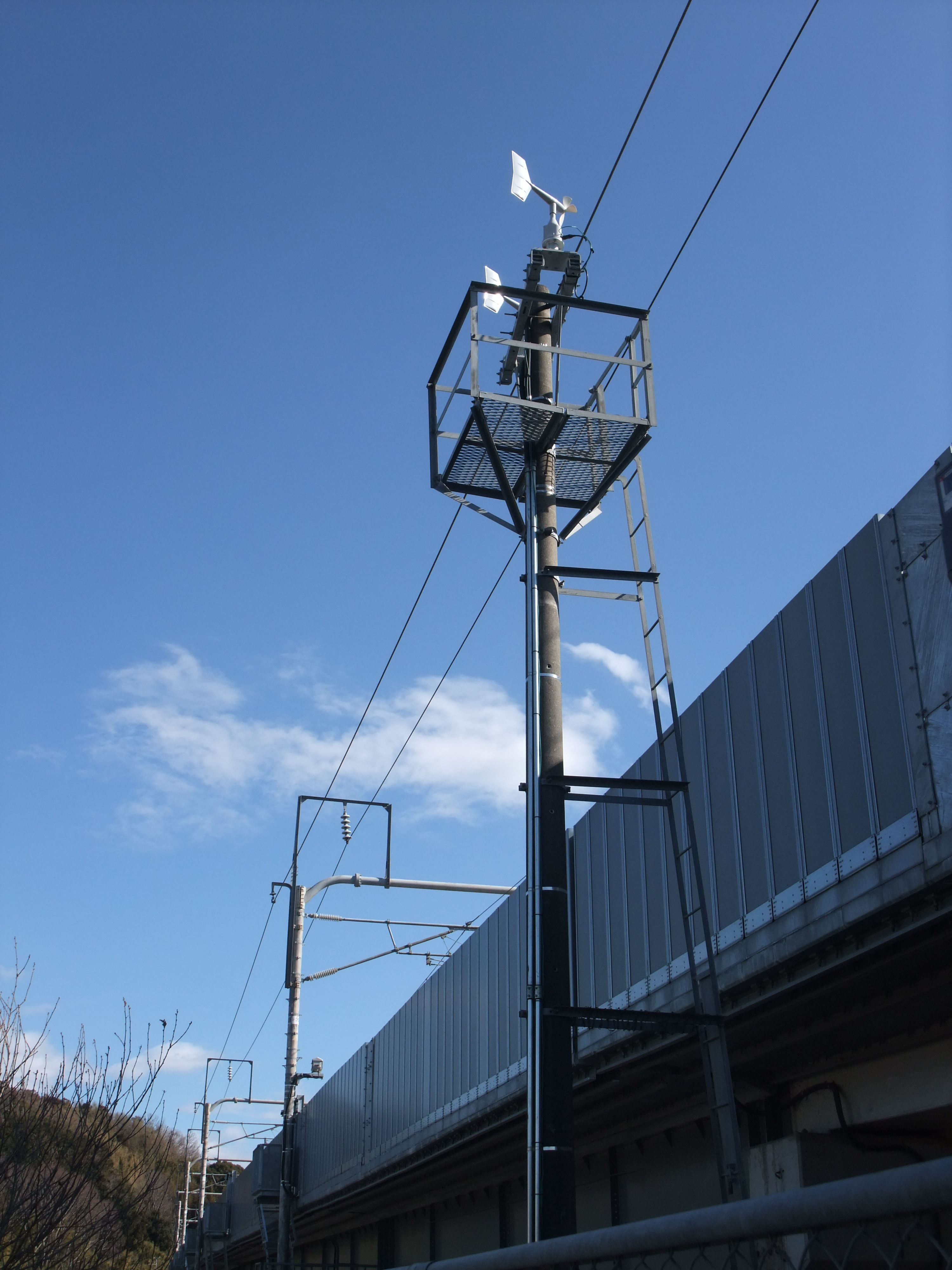 東海道新幹線の風速計、モデル線区間の中村川橋梁傍（小田原市） Fujifilm FinePix F100fd